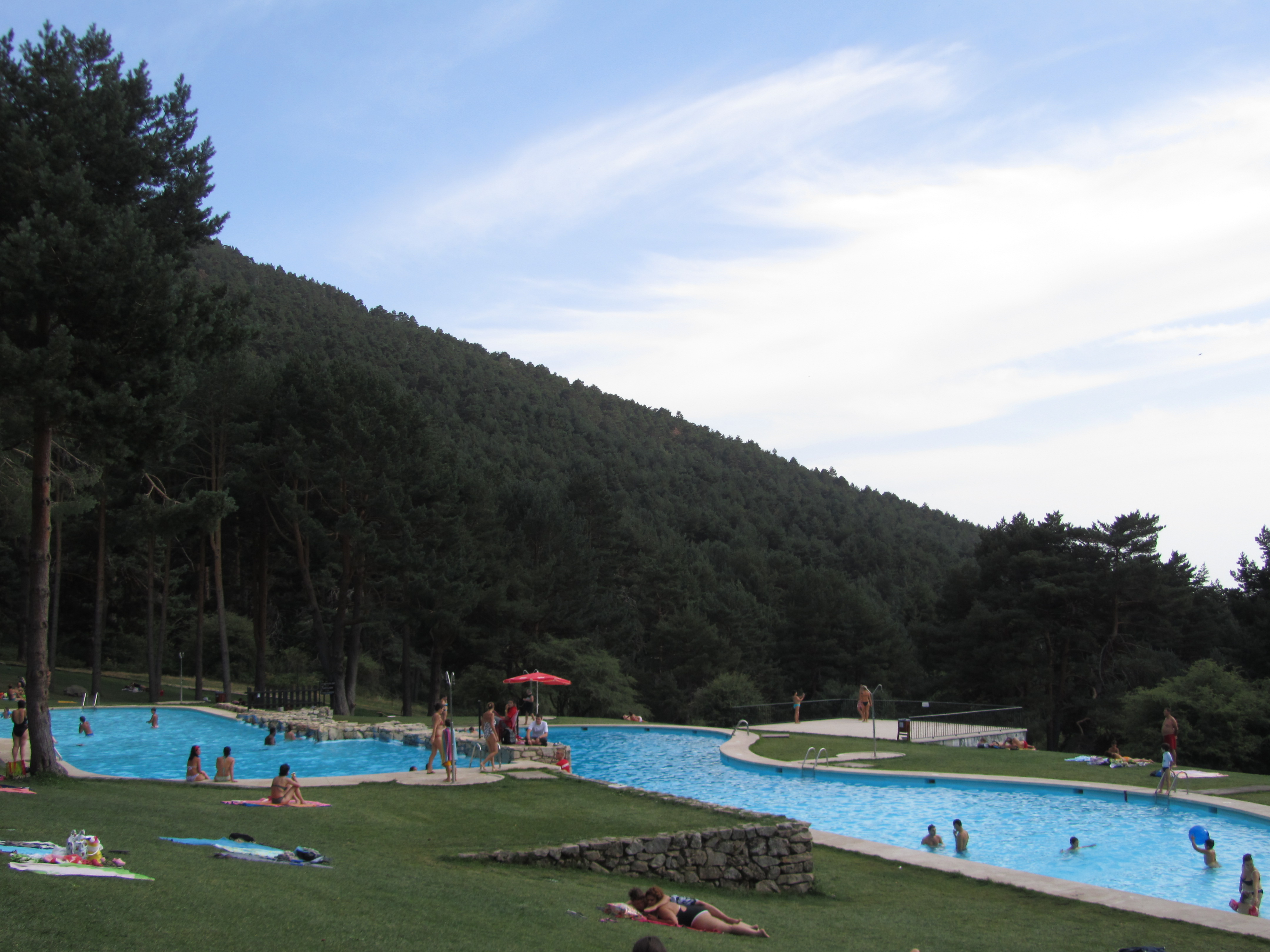 Las Berceas de Cercedilla